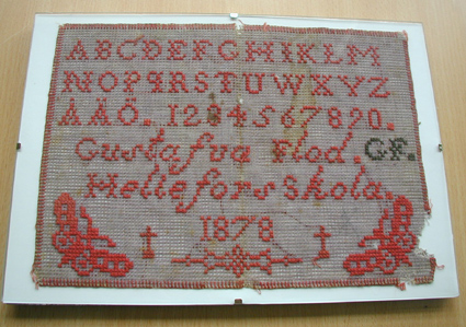 Gustava Flod, märkduk från 1878. Korsstygn.